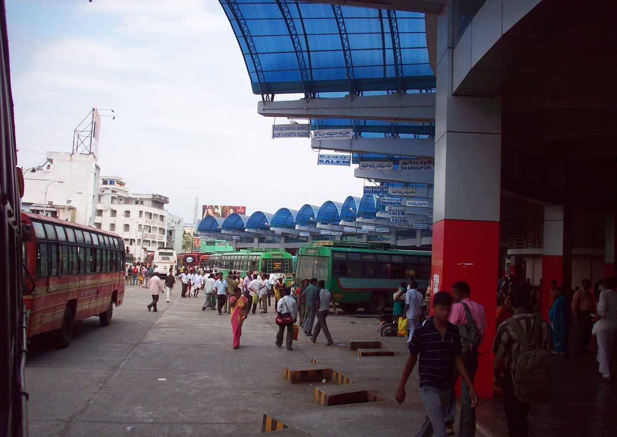 Internal Hosur Bus stand